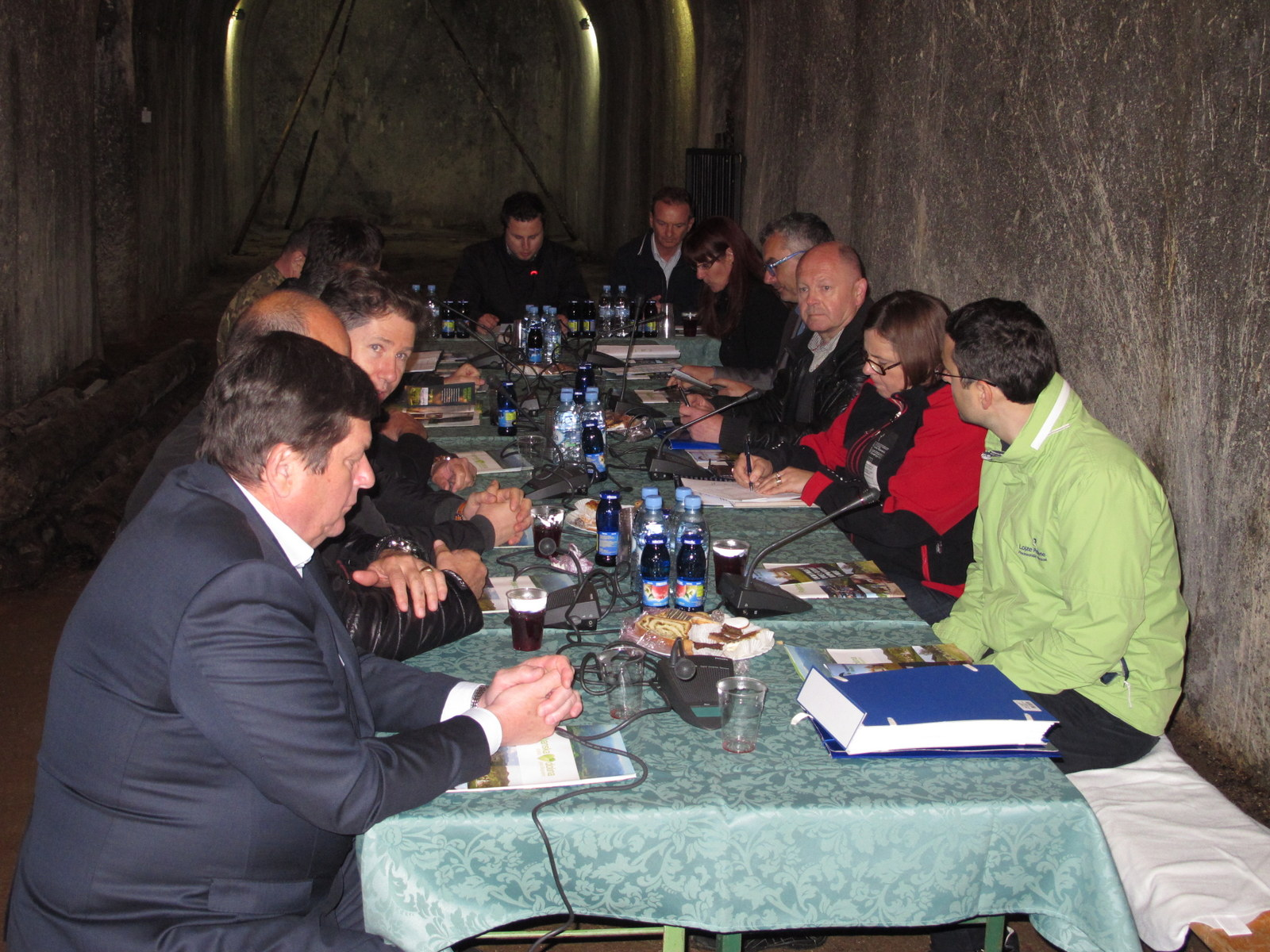 Seja Odbora za obrambo v utrdbi Rupnikove linije.